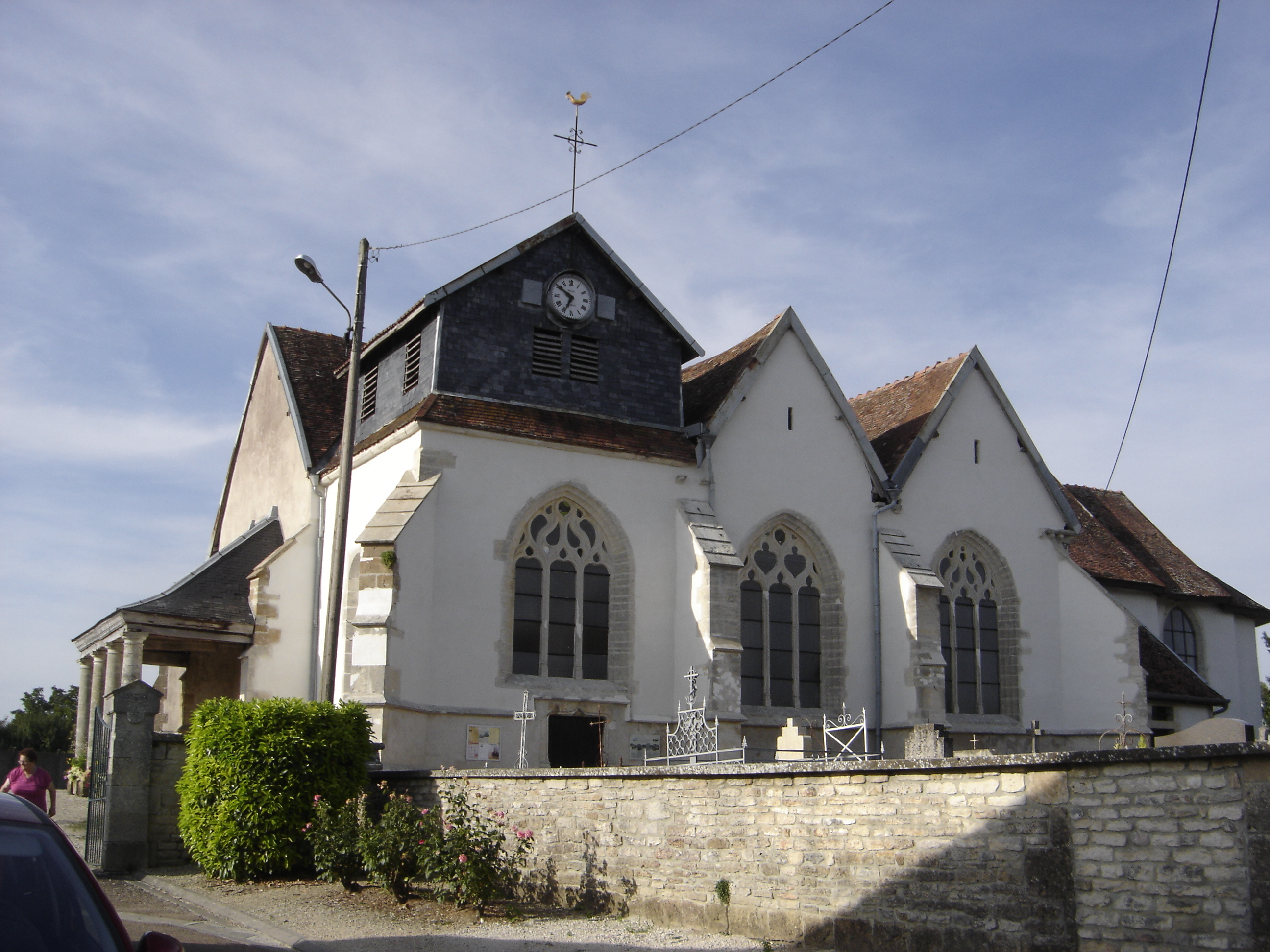 Eglise Notre-Dame de l'Assomption de Radonvilliers - Aube - France